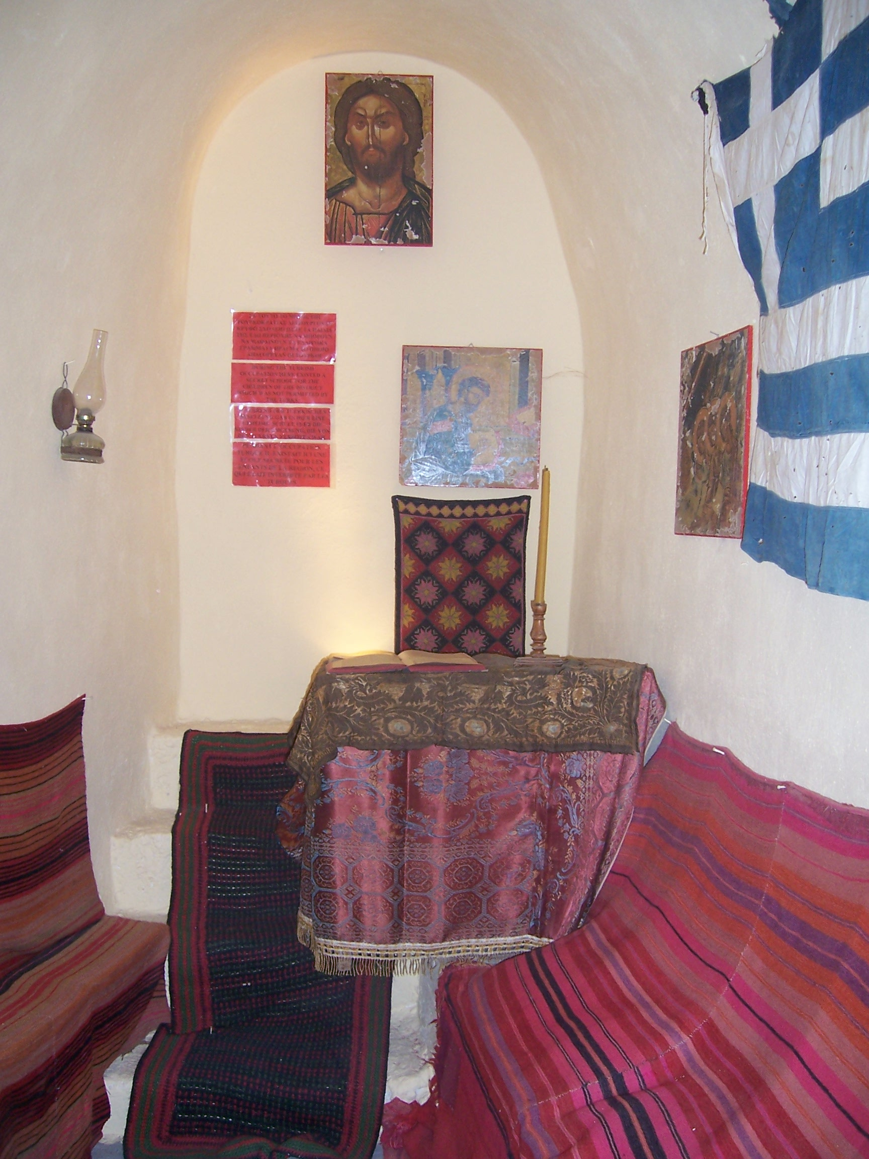 Monastère de Chryssoskalitissa. Reconstitution d'une école clandestine lors de l'occupation ottomane.